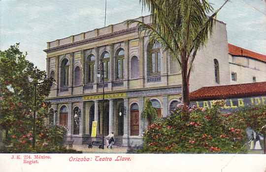 Teatro Llave, Orizaba, Mexico; "J. K. 224"